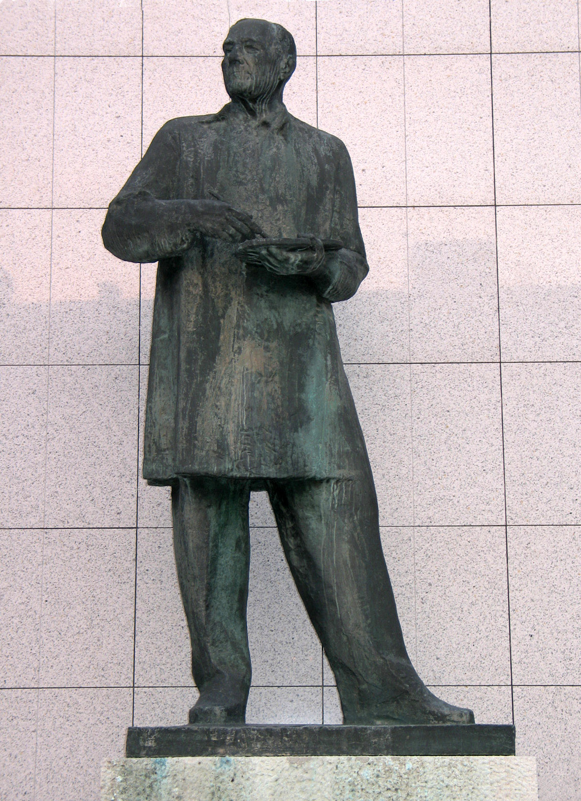 Bratislava. Bronzová plastika Martina Benku.